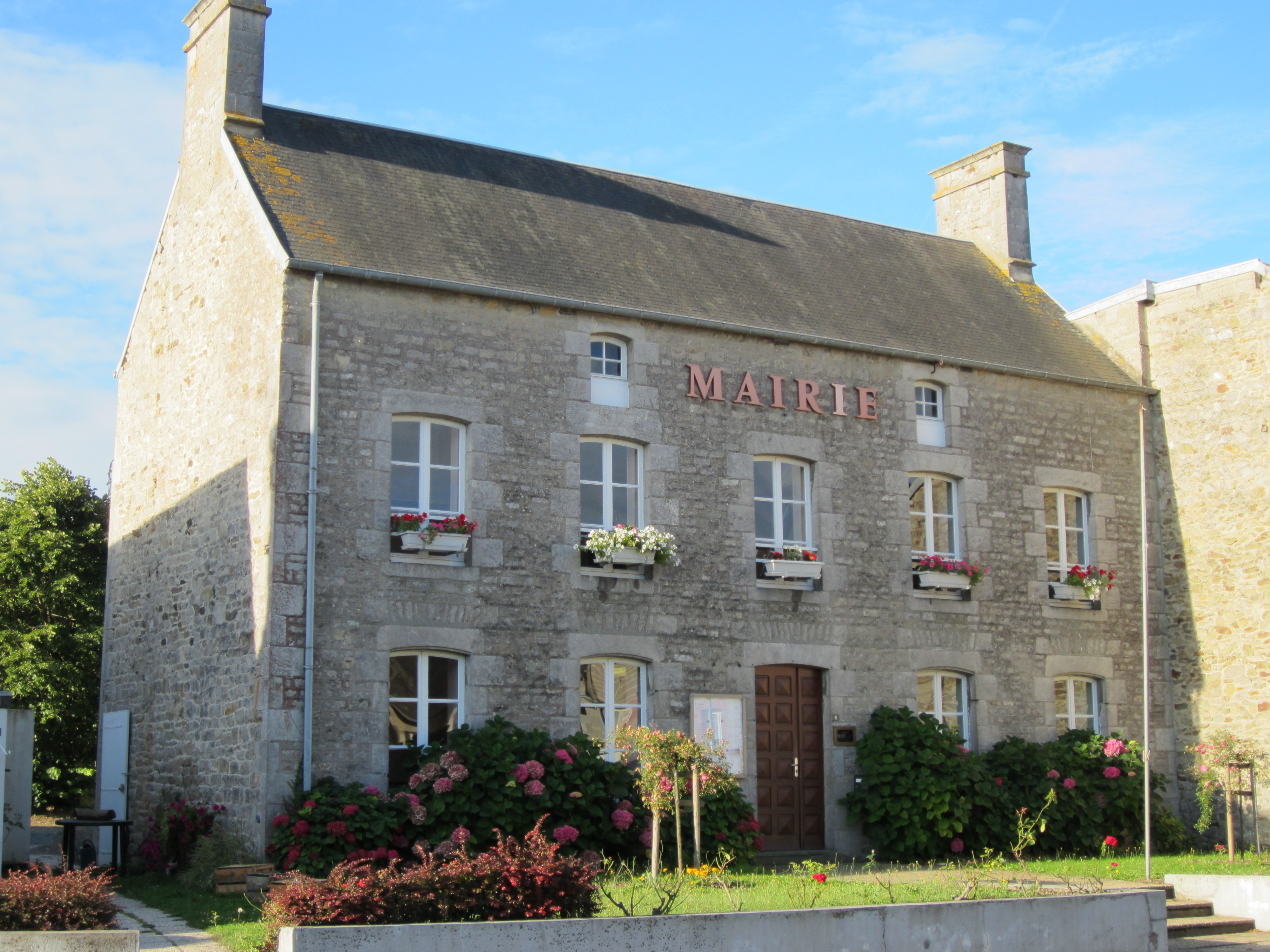 Lingreville